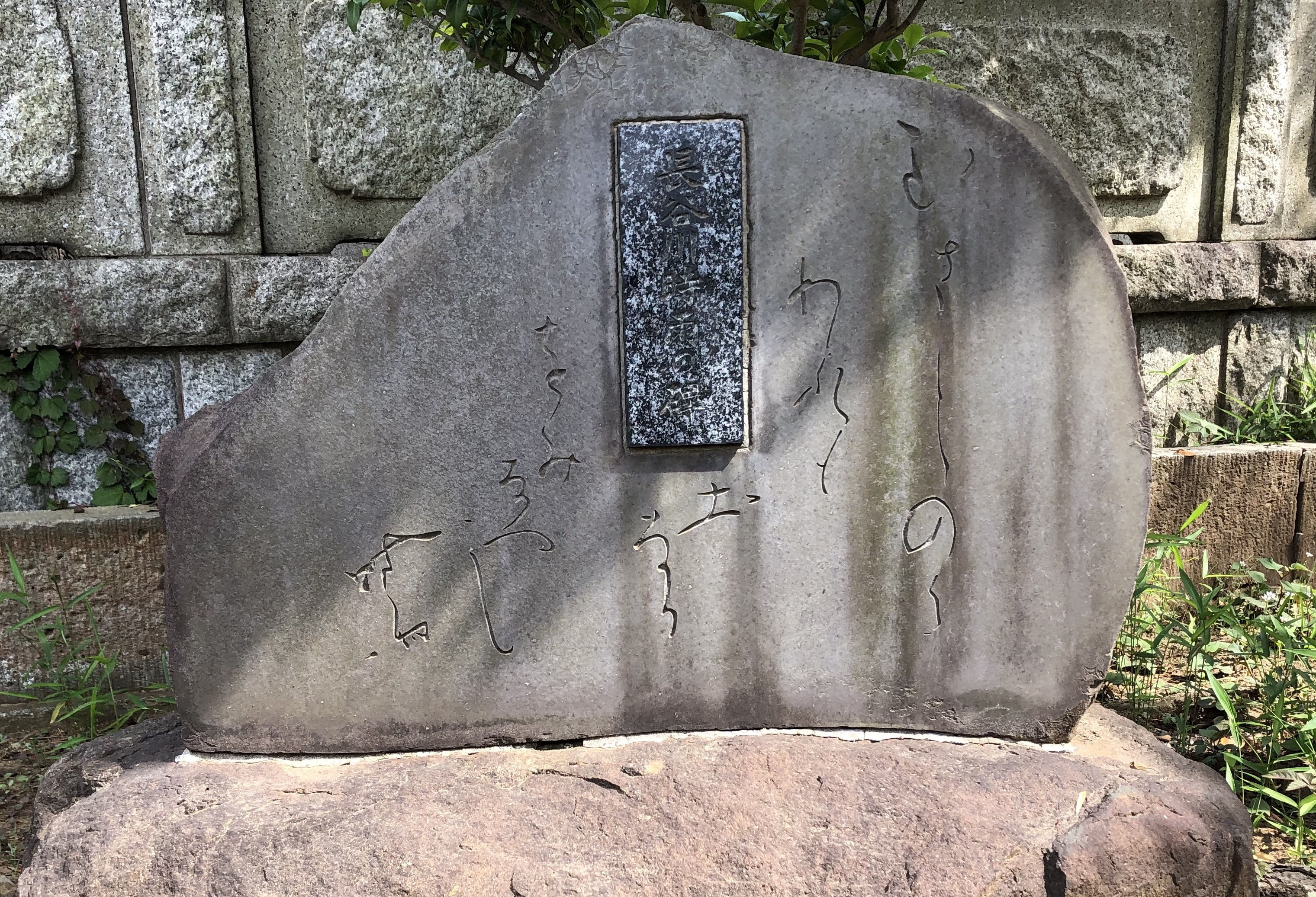 横浜市鶴見区總持寺墓地内の長谷川時雨文学碑